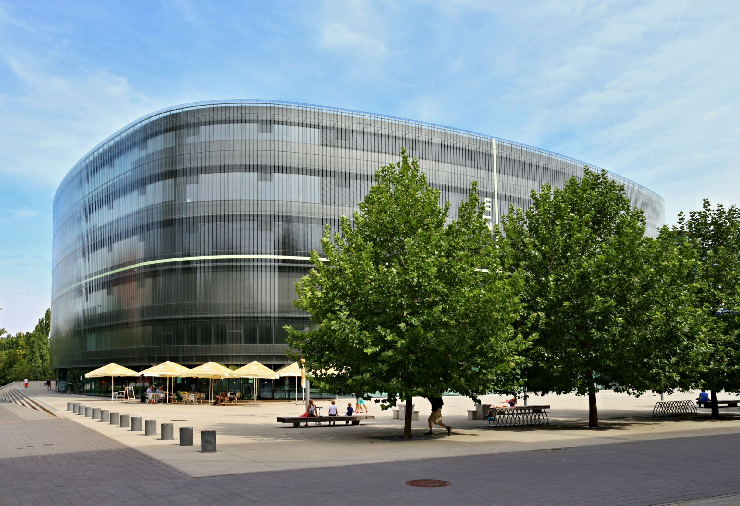 Česká národní technická knihovna v Dejvicích